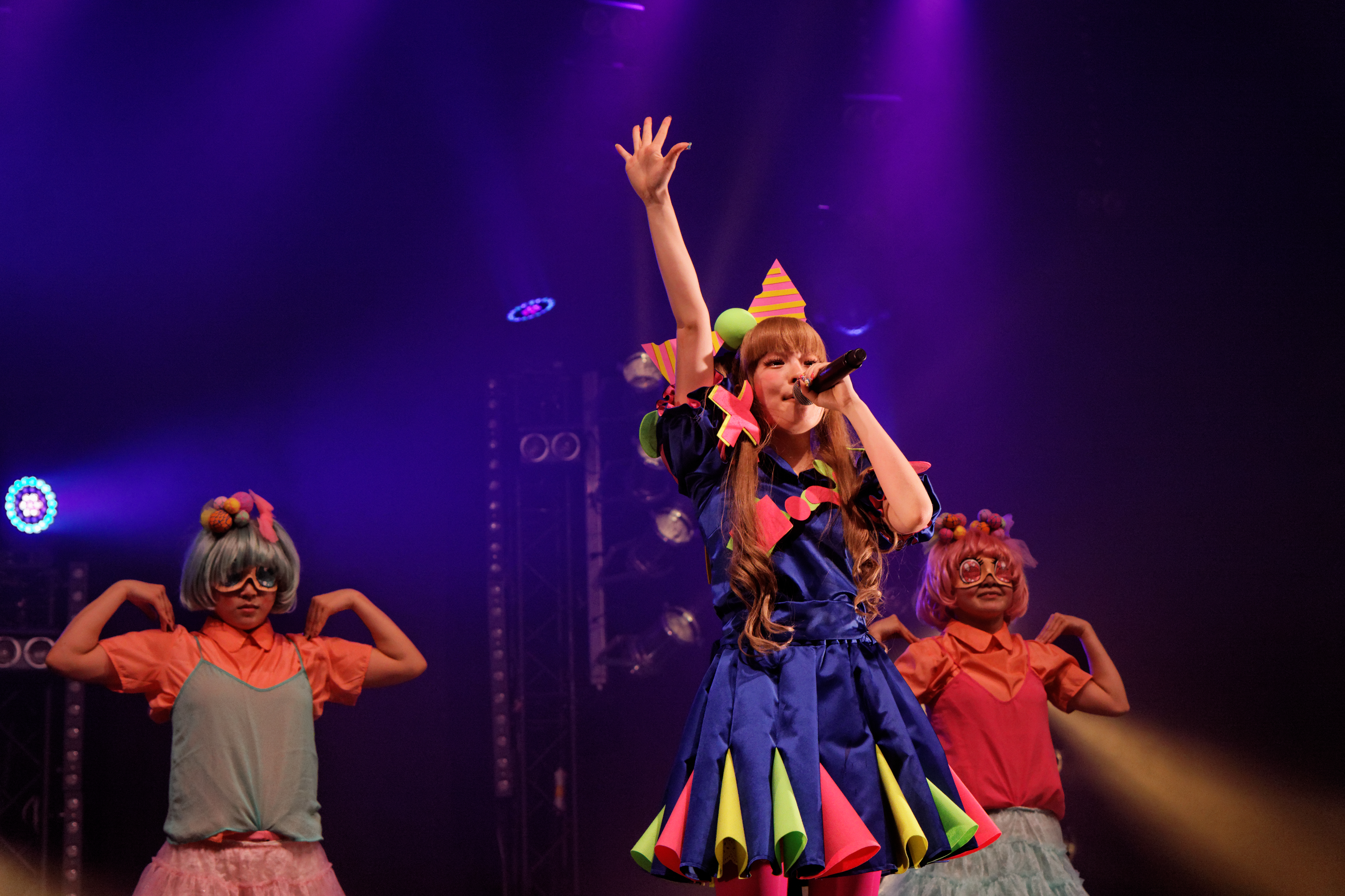 Kyary Pamyu Pamyu en concert à Japan expo 2012.